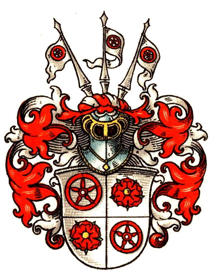 Wappen der von Hoerde II